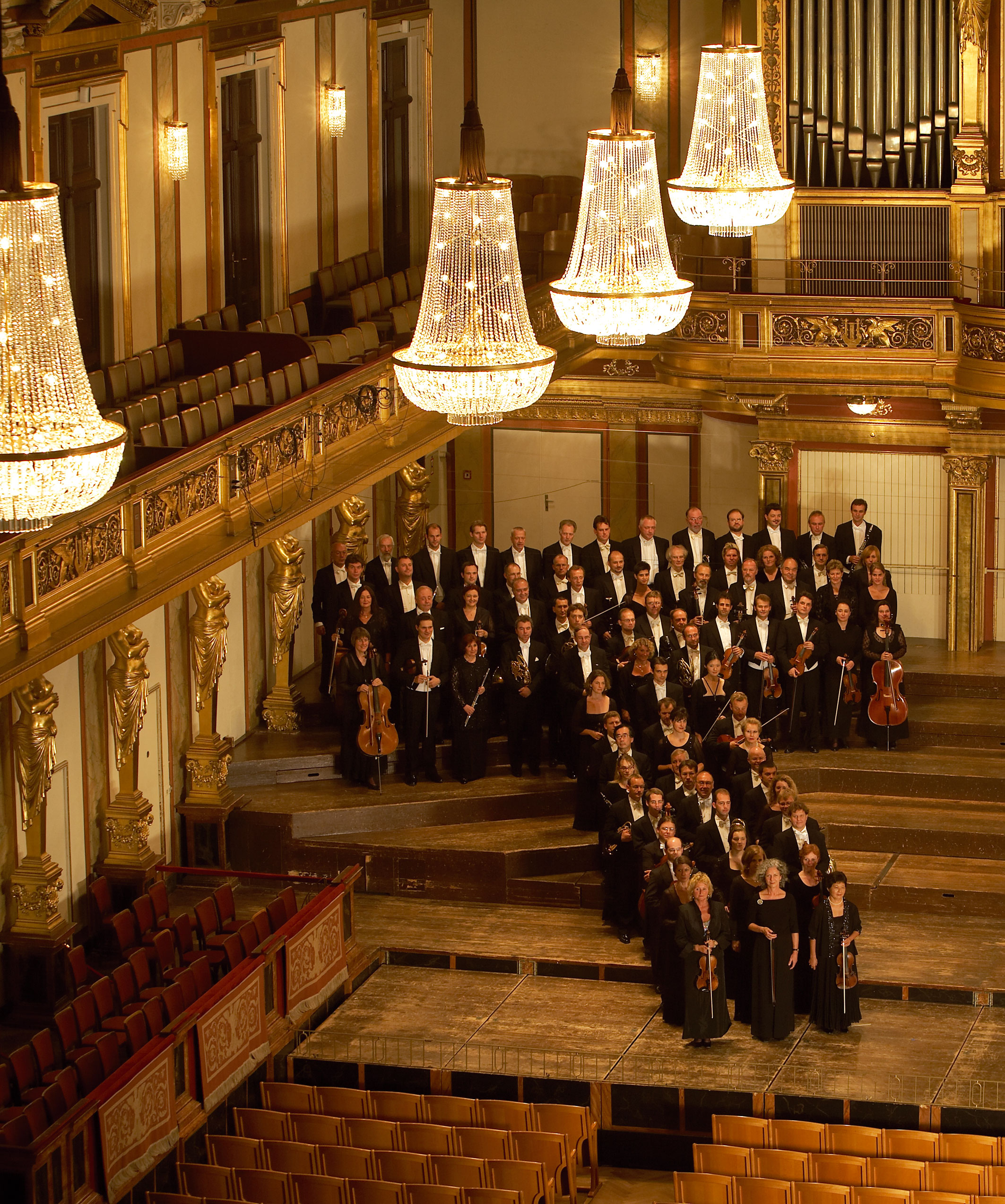 Tonkünstler-Orchester NÖ im Musikverein Wien